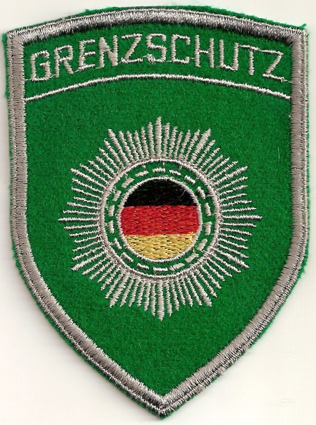 Ärmelabzeichen des „Grenzschutz der DDR“ (1990)